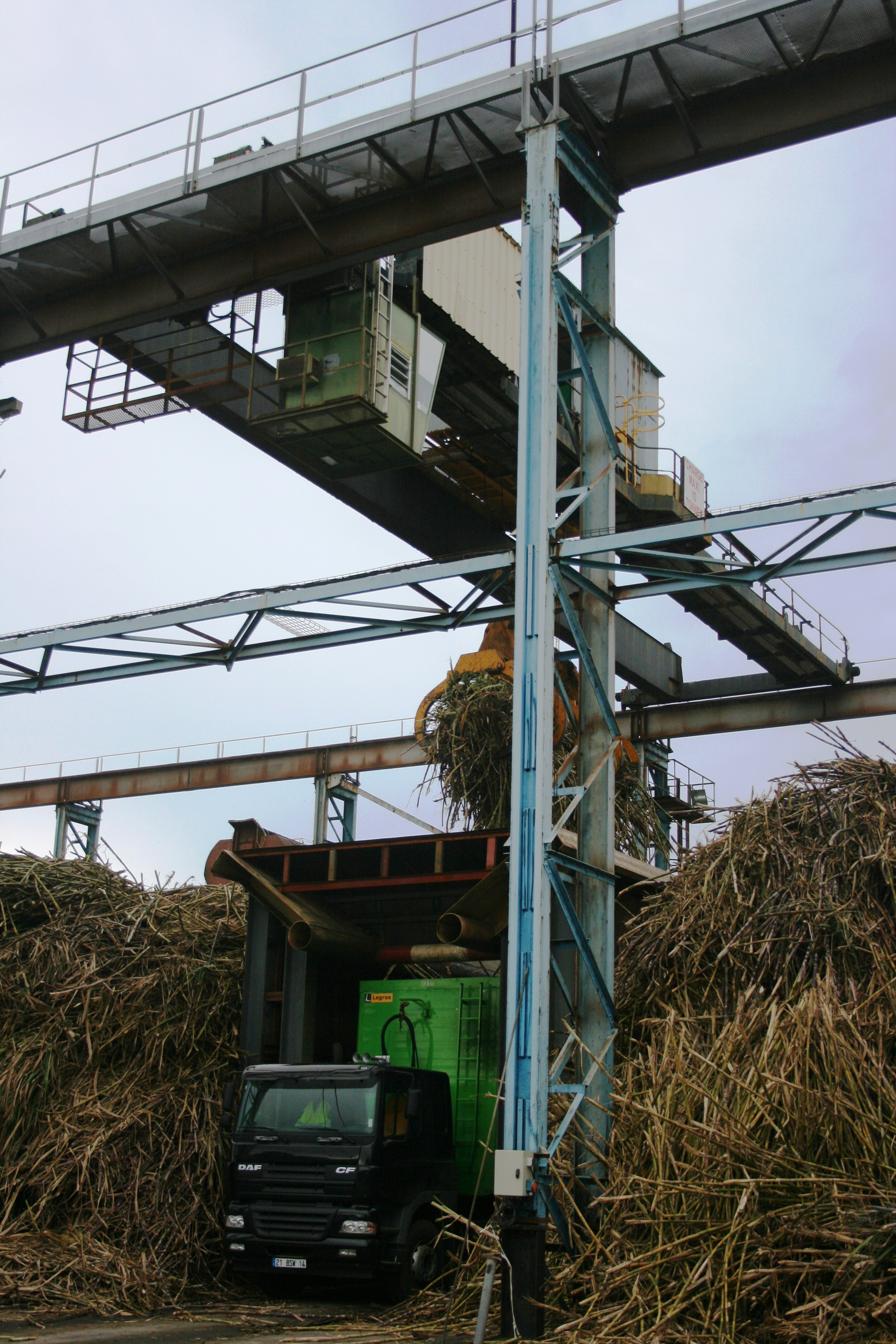 Le chargement d'un camion en cannes à sucre à l'usine de Beaufonds de Saint-Benoît, sur l'île de la Réunion